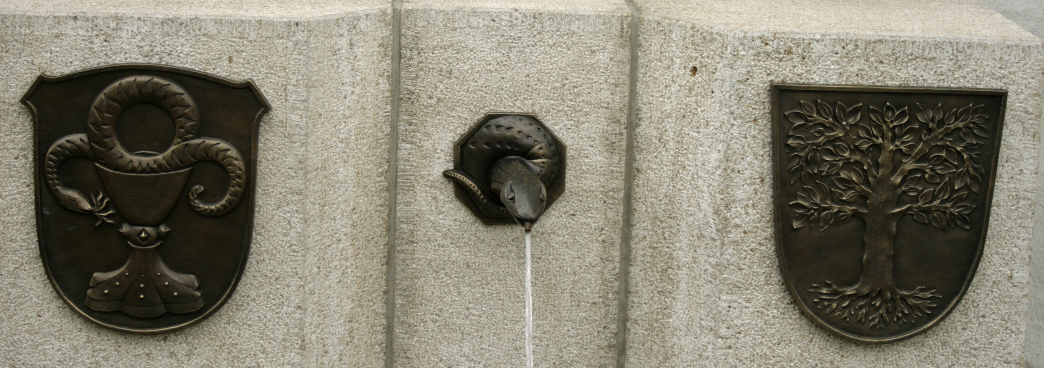 Wappen von Elz (links) und der Partnerstadt Wldmünchen am Partnerschaftsbrunnen in Elz, Deutschland